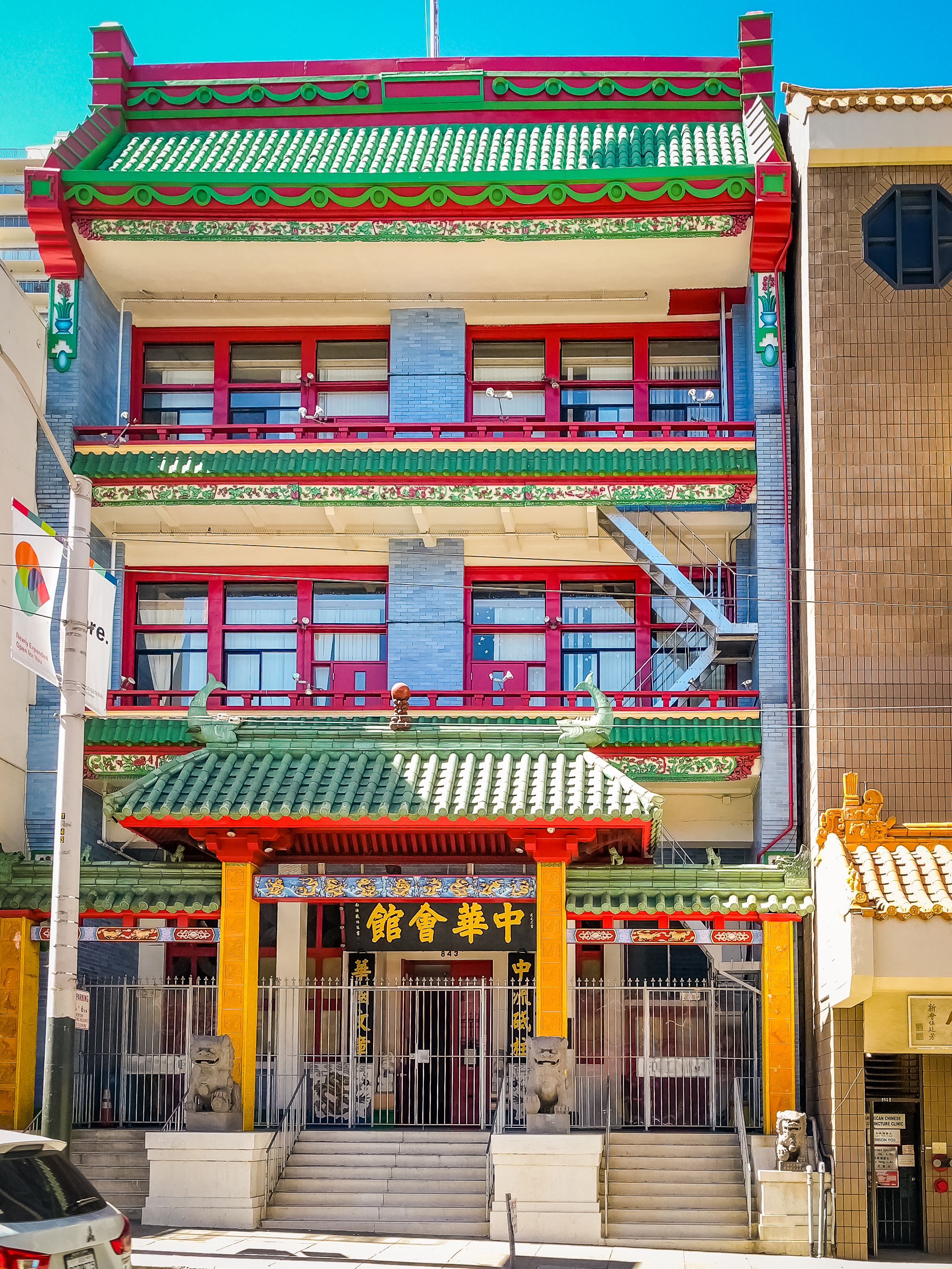 San Francisco